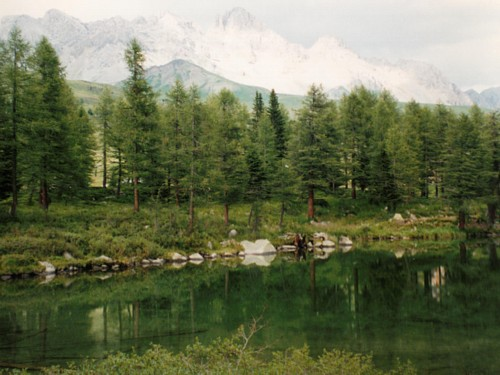 Bergmeer op de San Pellegrinopas